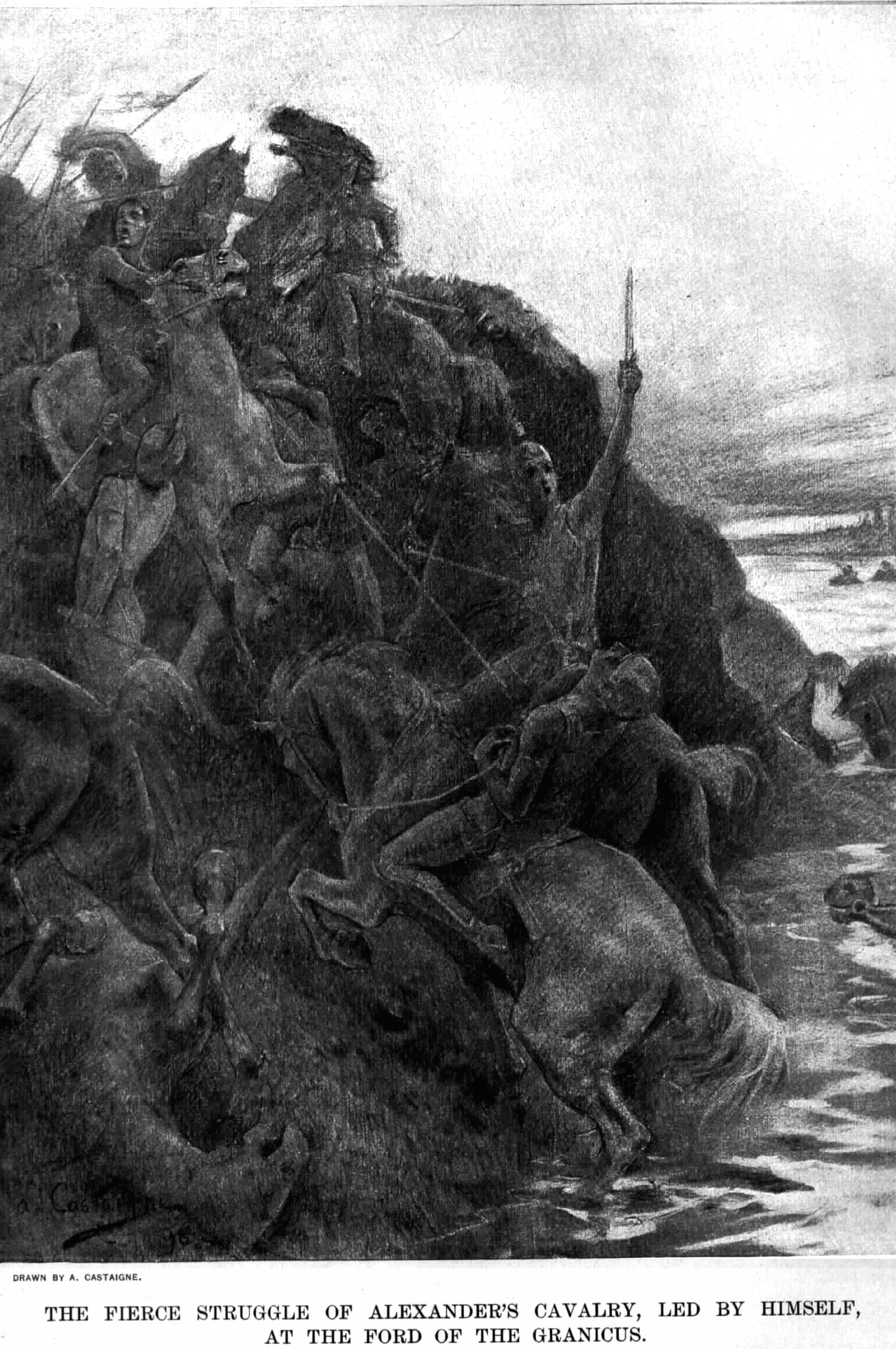 Alexander old drawings